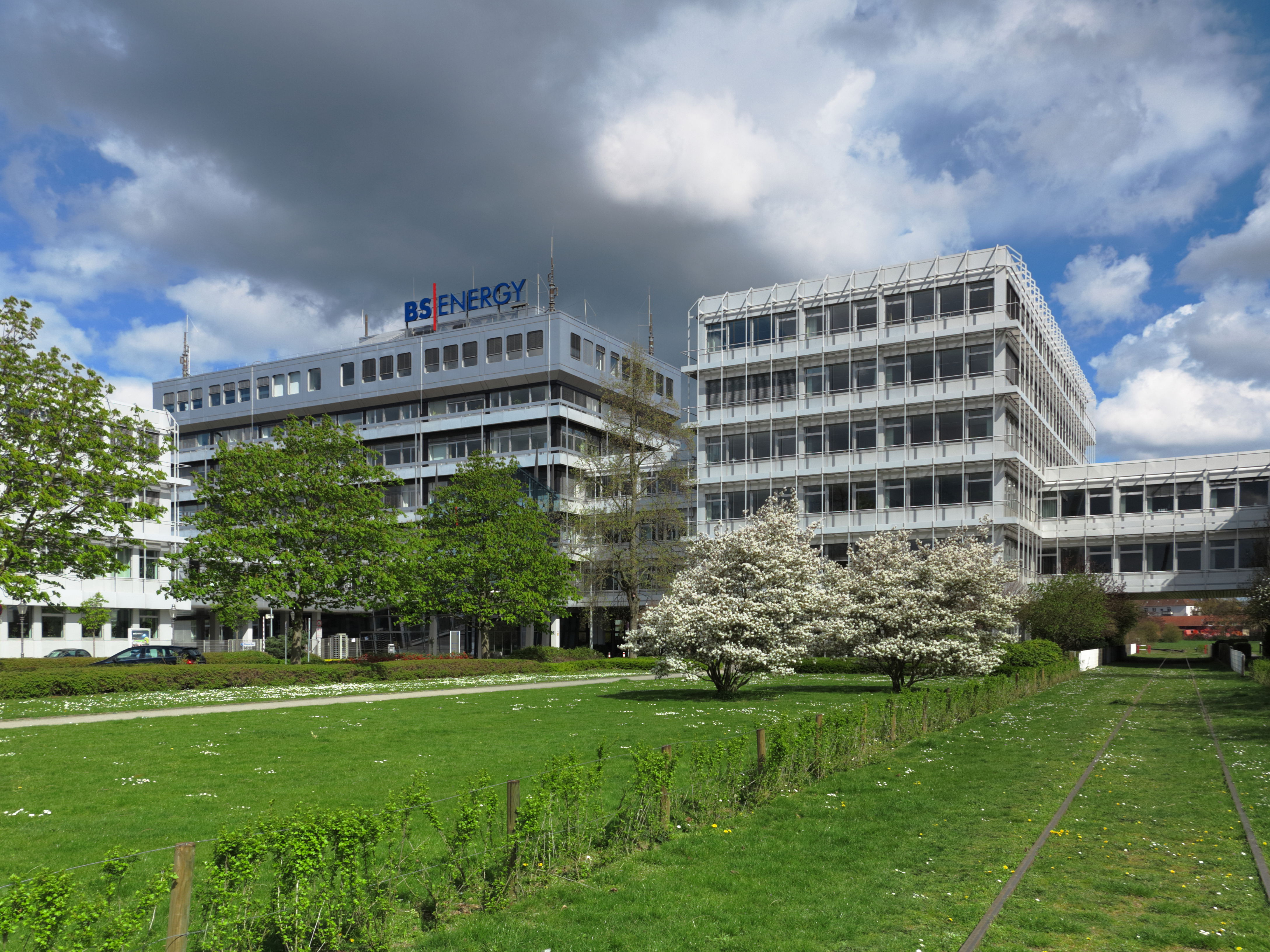 Braunschweig: die Unternehmenszentrale von BS|Energy